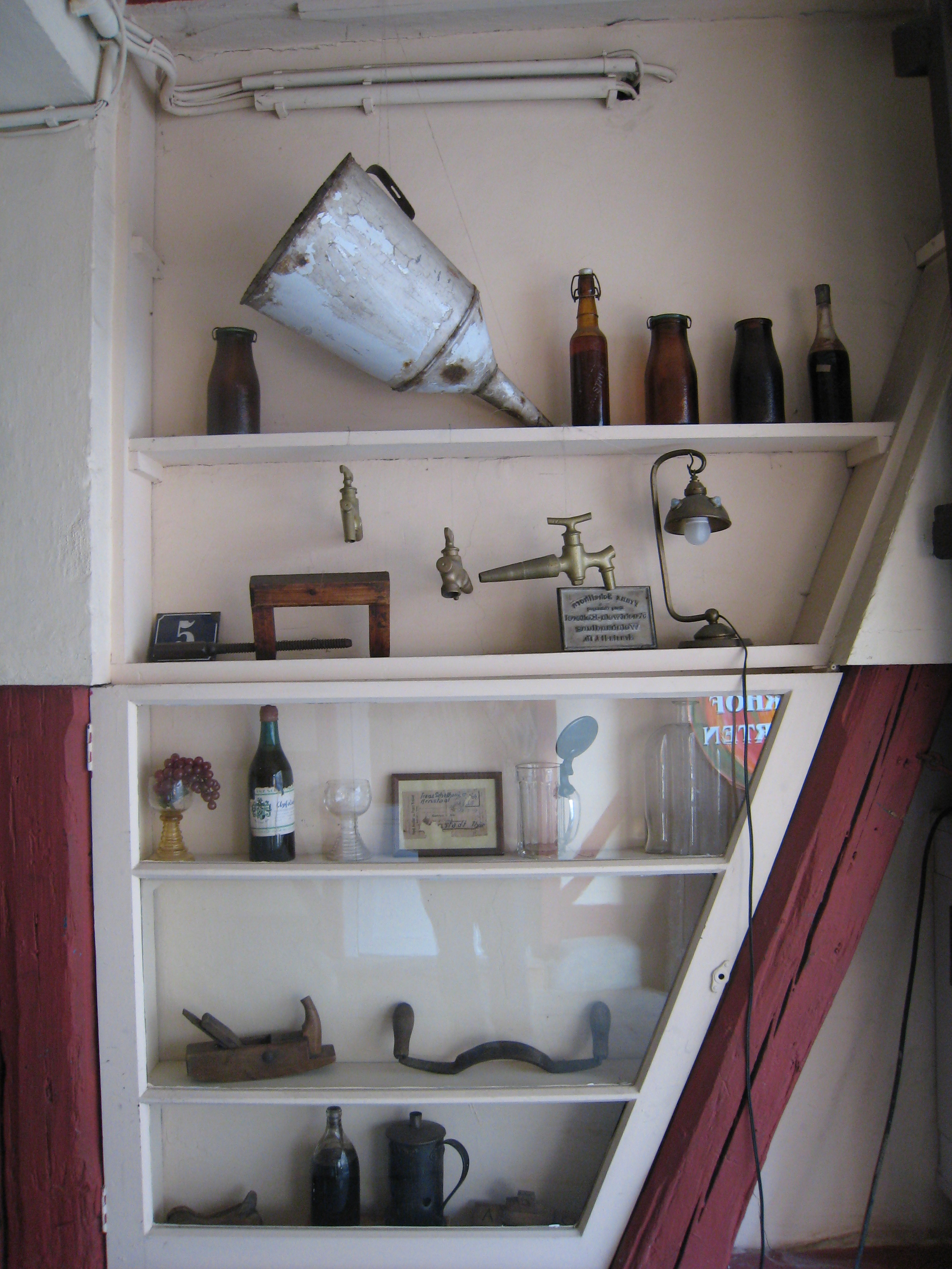 Geräte zum Keltern im Hof des Gasthauses Schellhorn in Arnstadt